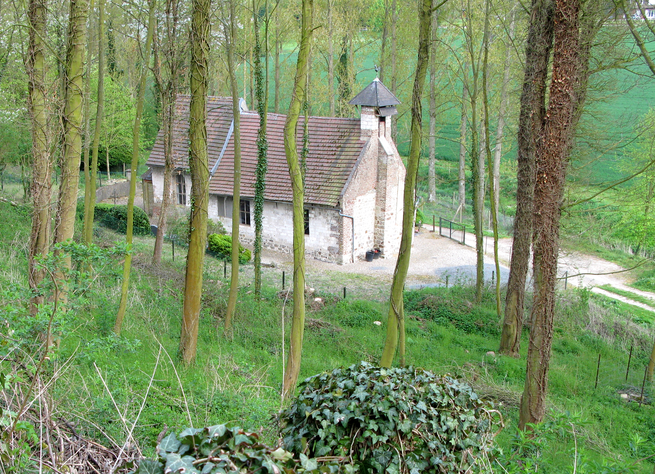 Séricourt (Pas-de-Calais, France) - L'église. .